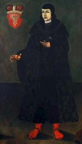 Janusz Mazowiecki